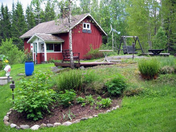 Kesämökki Vihdissä